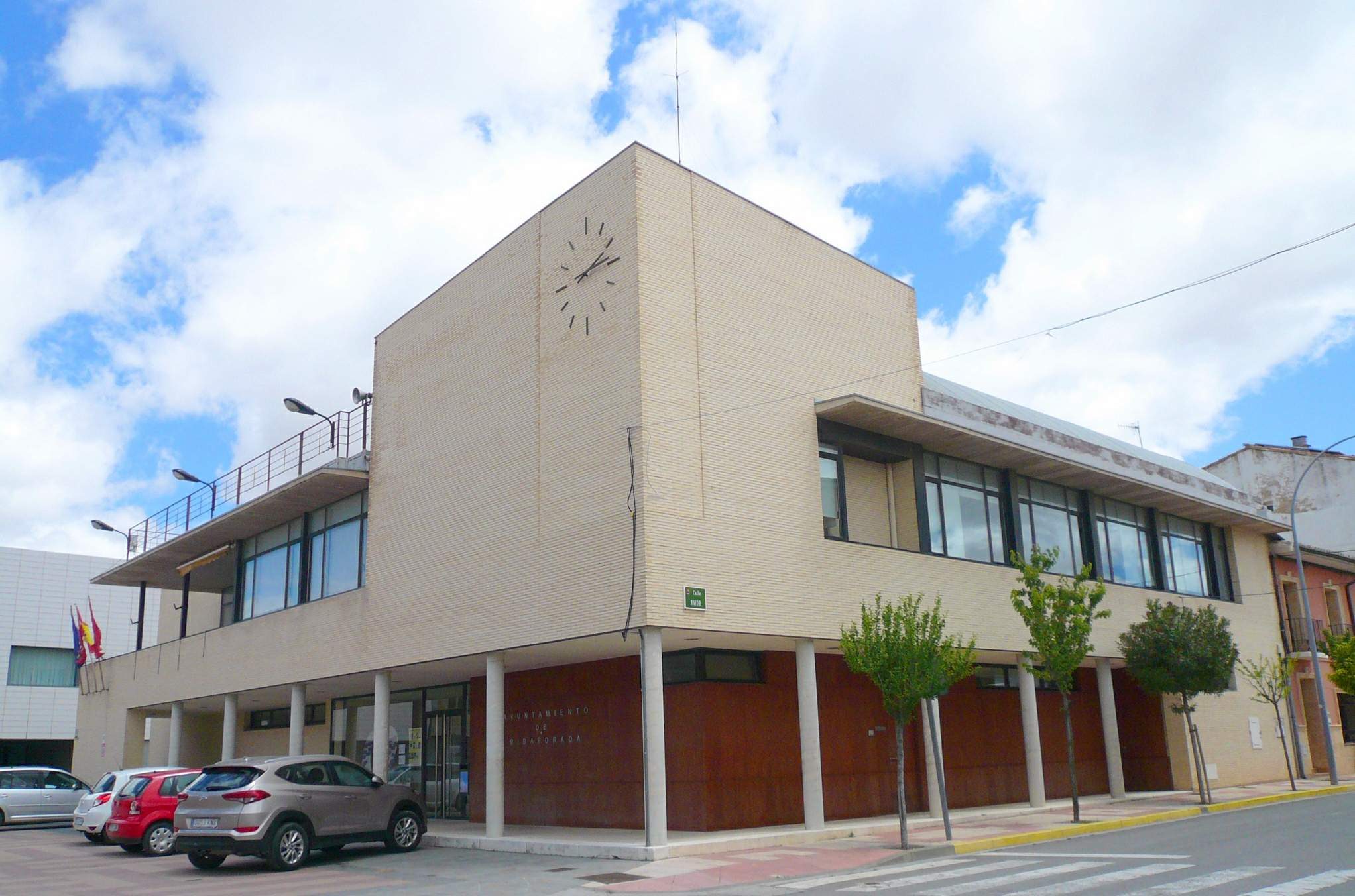 Ayuntamiento de Ribaforada (Navarra)